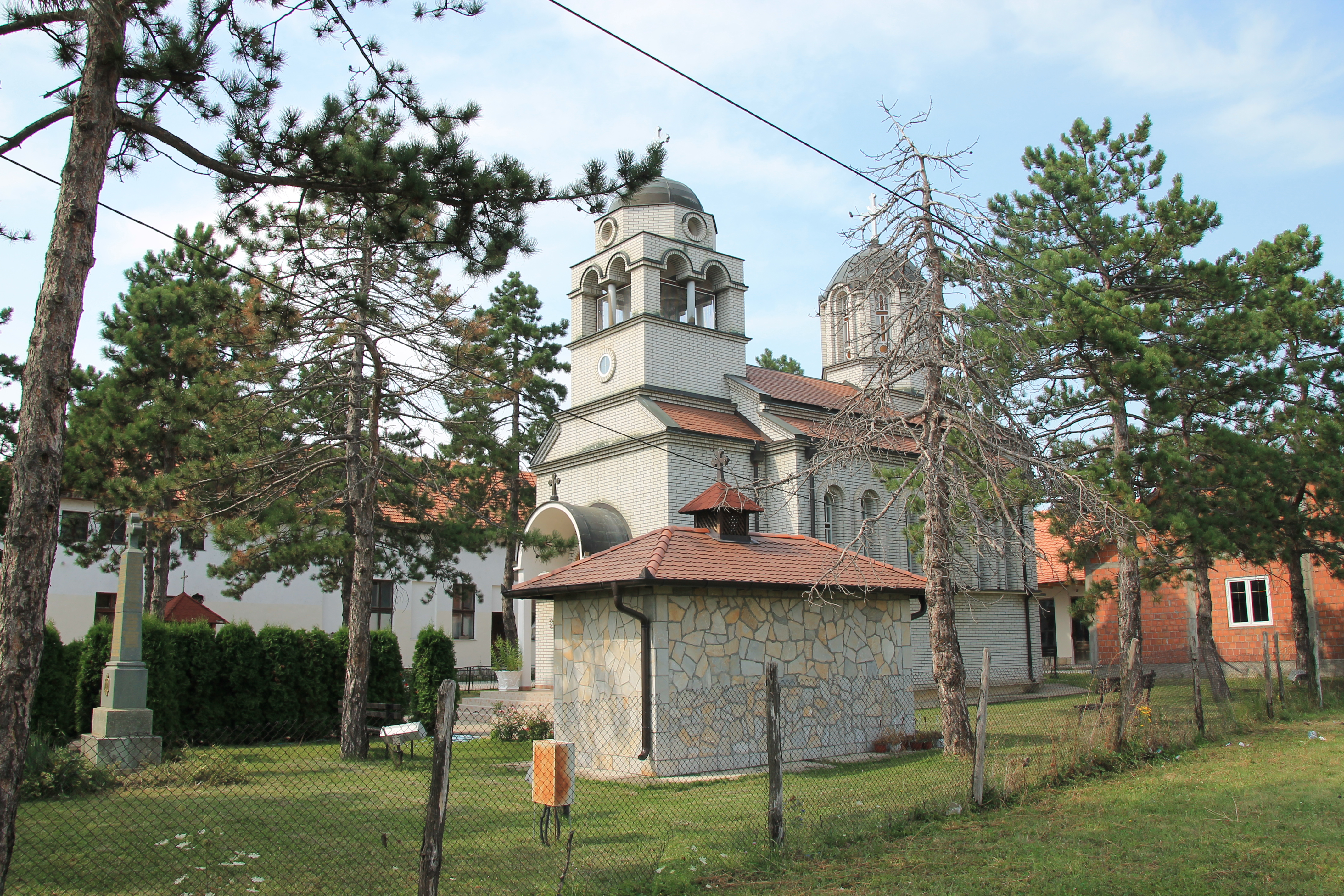 Crkva Svete Trojice (Cerovac)